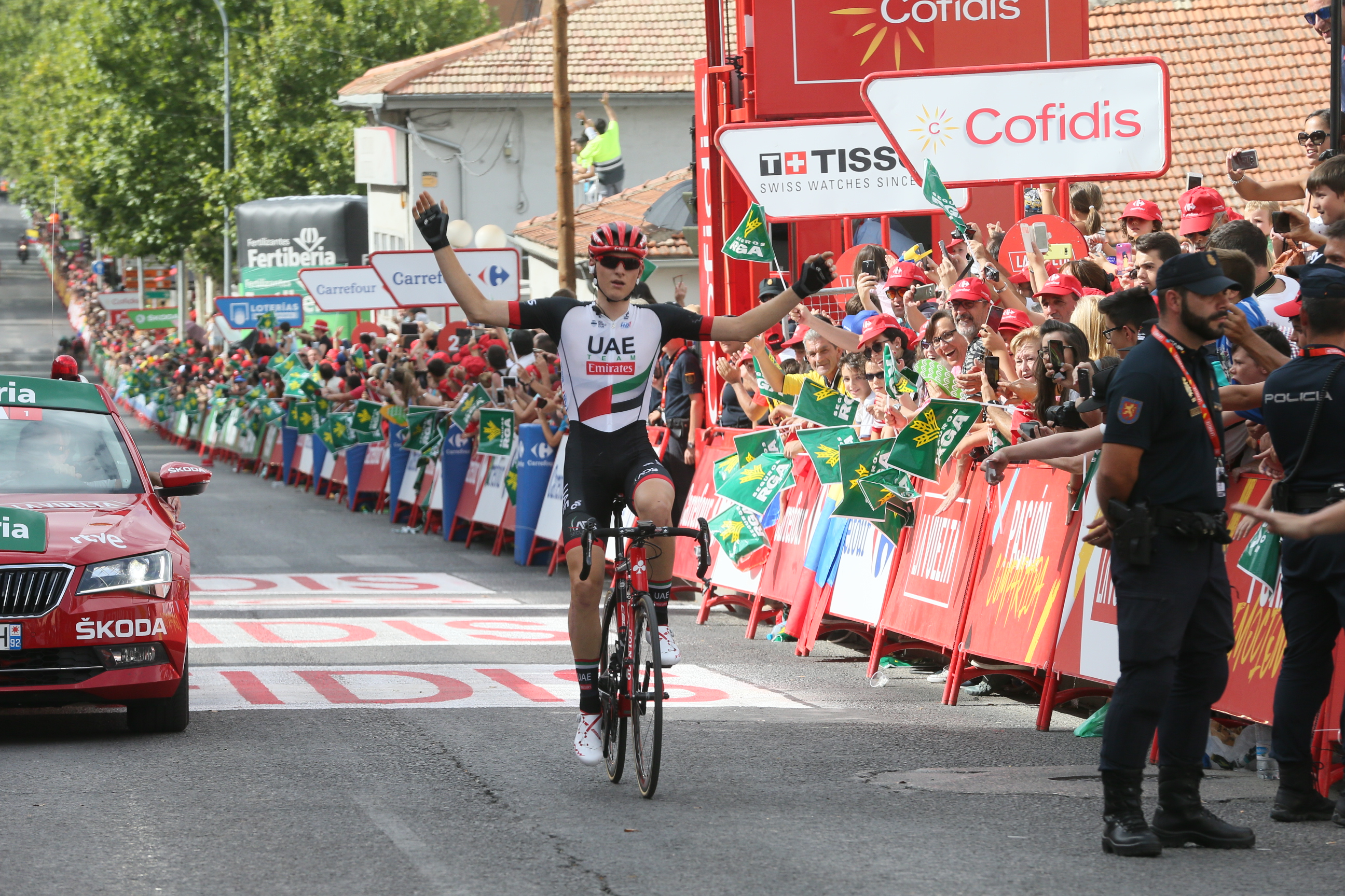 CUENCA, 25/08/2017. El presidente de Castilla-La Mancha, Emiliano García-Page, asiste al final de la séptima etapa de La Vuelta Ciclista a España, con meta en la capital conquense, donde hará entrega del premio al líder provisional de la clasificación general. (Fotos: Ignacio López//JCCM)